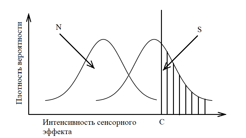 Метод ТОС. Модель обнаружения сигнала для жесткого критерия